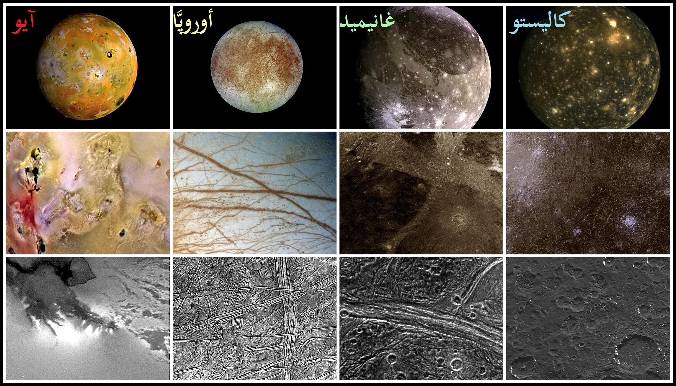 صورة لأقمار المُشتري الثلاثة: كاليستو، وغانميد، وأوروبَّا، وآيو.